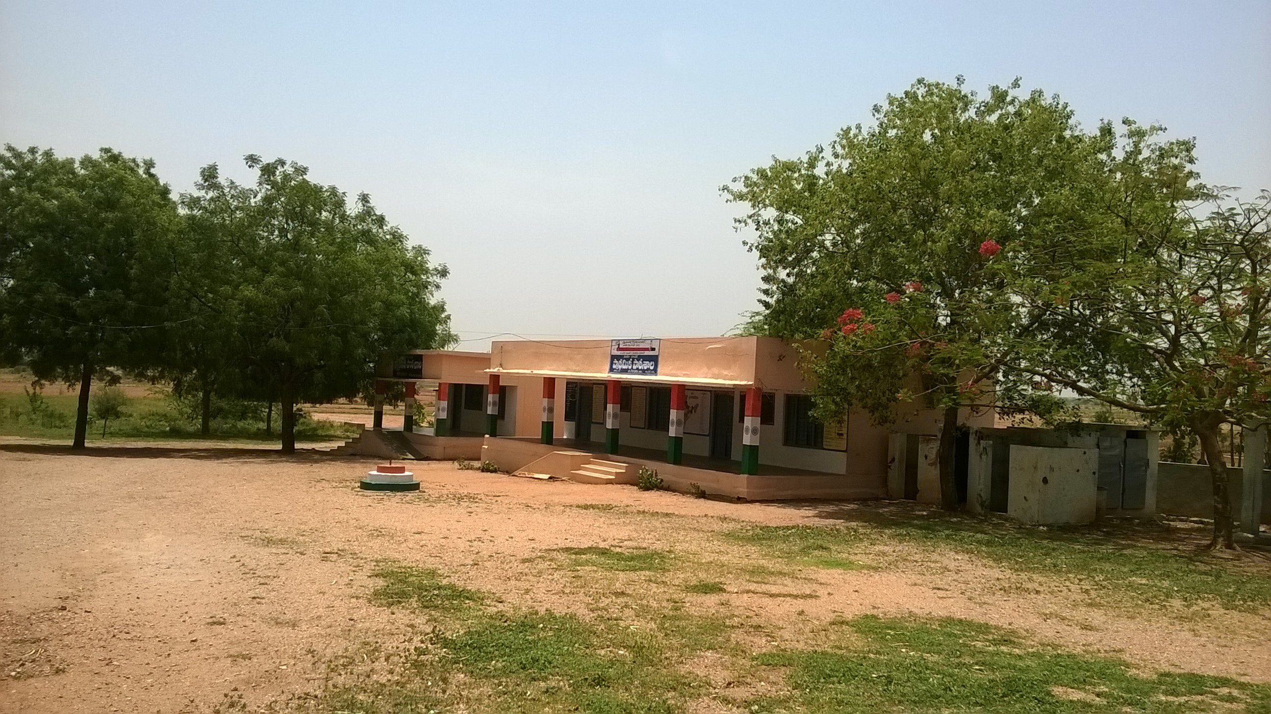 ప్రాథమిక పాఠశాల, బి.వీరాపురం